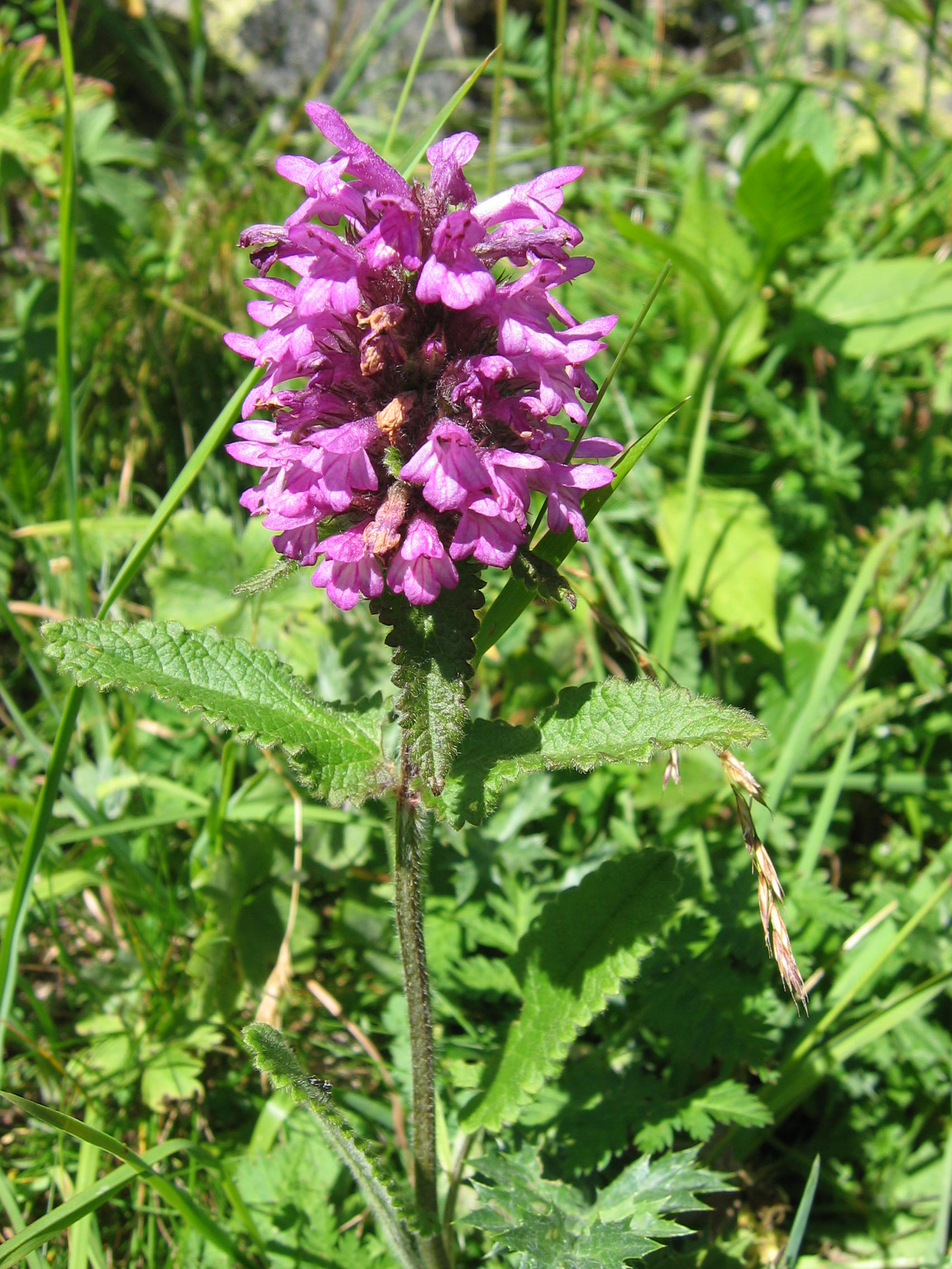 Stachys pradica : Lac Léama - Belledonne - France (38)